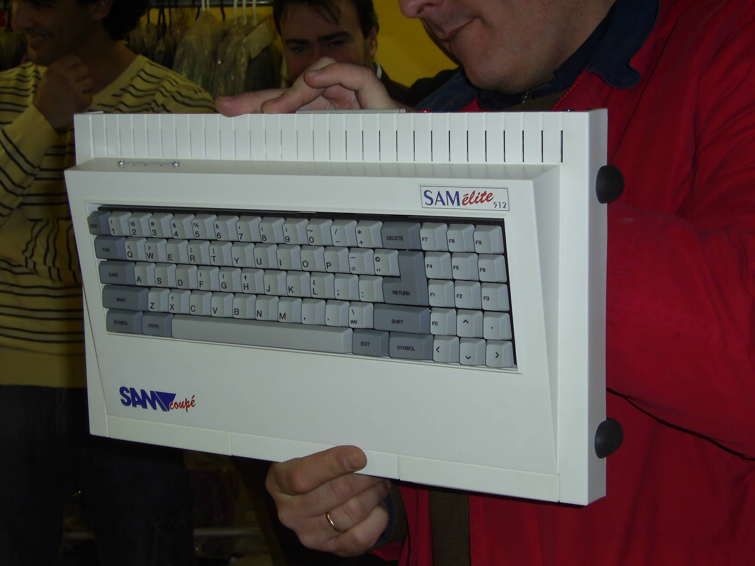 SAM Élite, un SAM Coupé con dos unidades de disco y 512 Kb de RAM. El Equipo de la imagen es parte de la colección de Juan Jose Garcia Gonzalez , el mayor coleccionista de España de RetroInformática